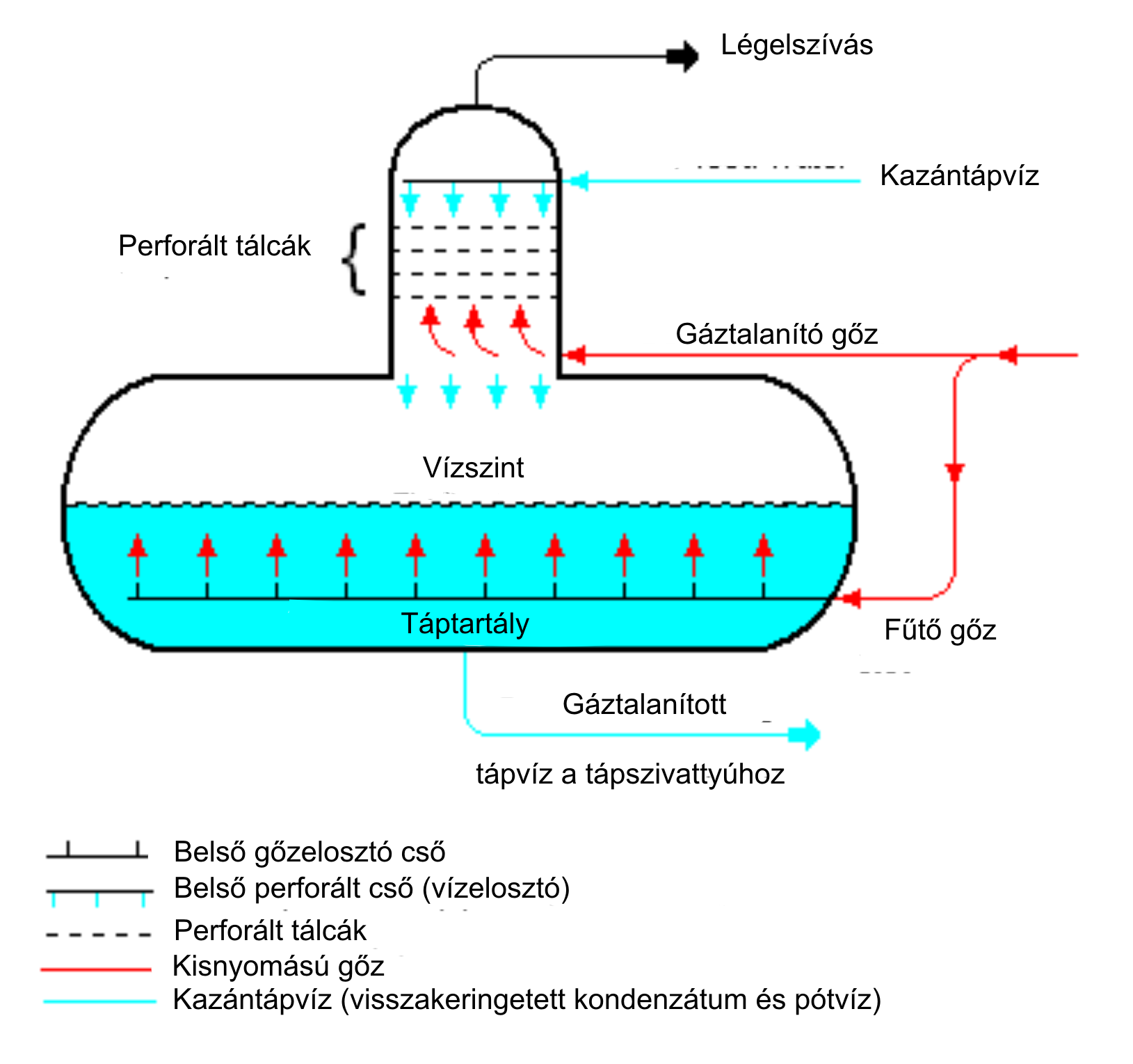 Termikus gáztalanító vázlata